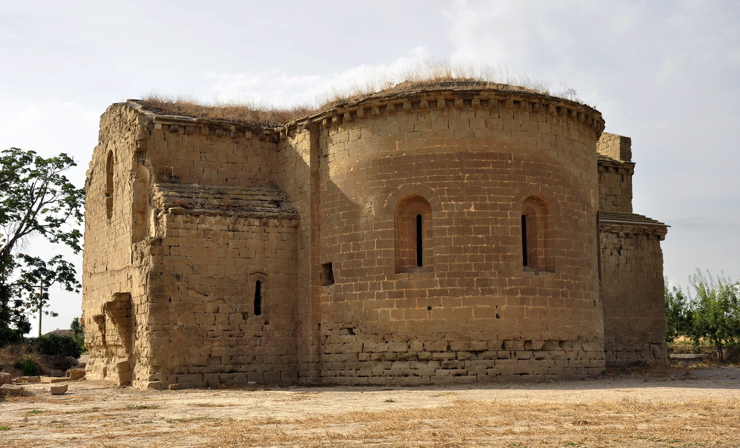 L'absis